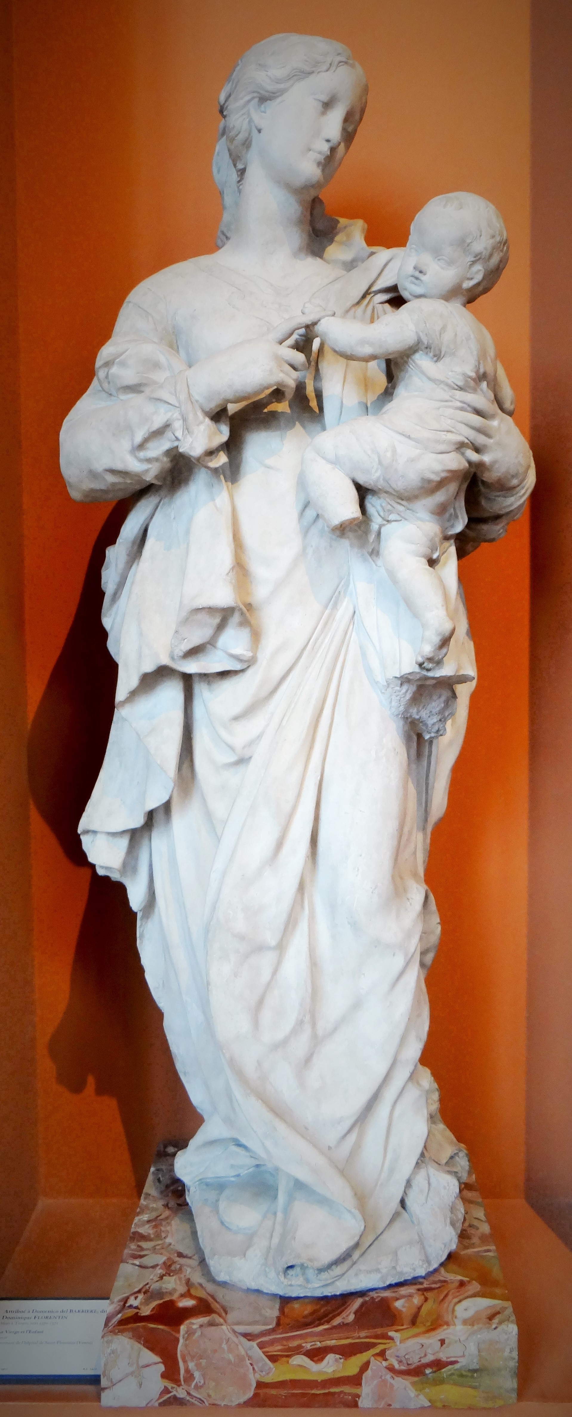 La Vierge et l'Enfant, pierre, attribué à Domenico del BARBIERE, dit Dominique FLORENTIN, mort à Troyes vers 1570-1571 Pierre. Provenant de l'hôpital de Saint-Florentin (Yonne)